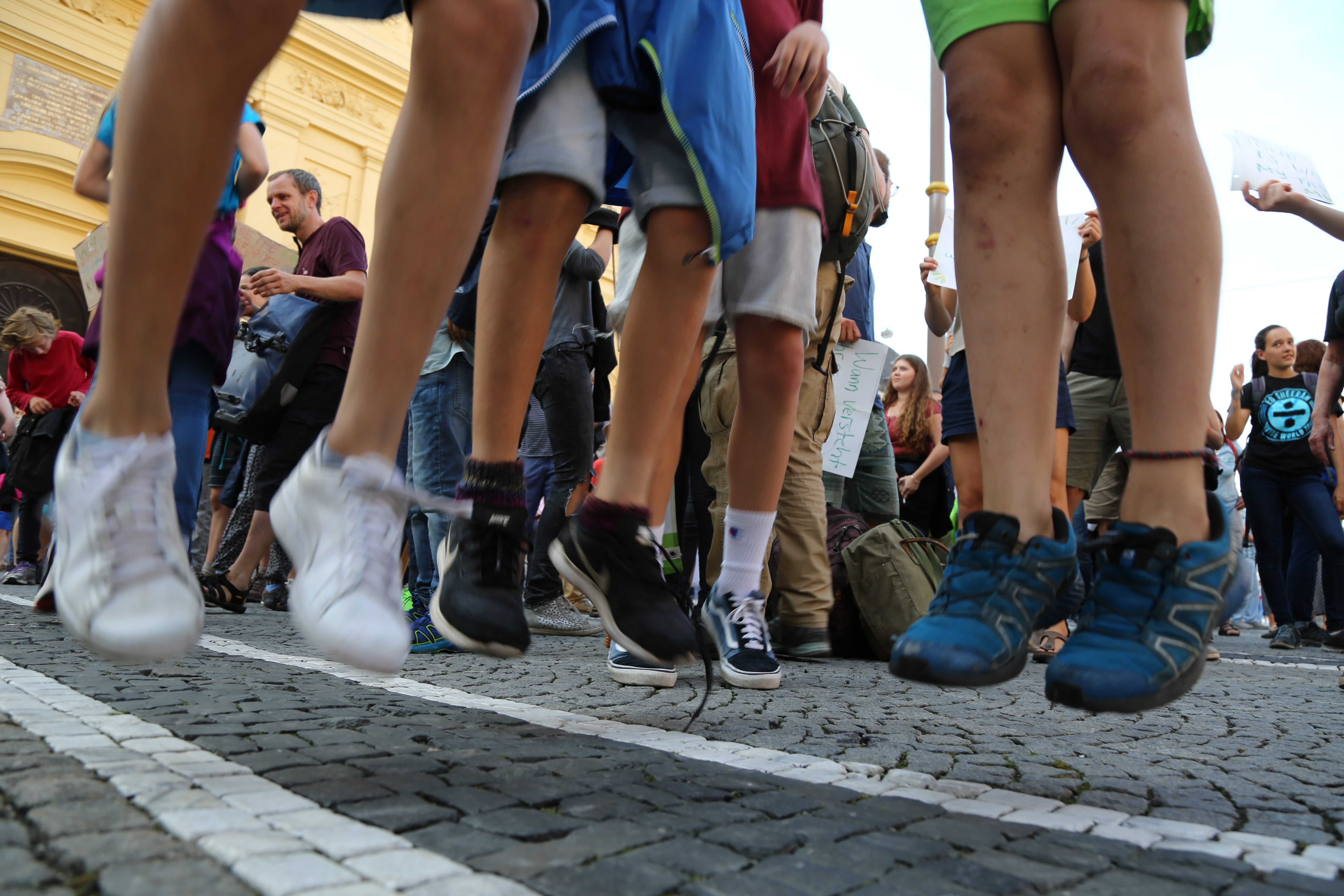 "Wer nicht hüpft, der ist für Kohle". Aufruf auf Demonstrationen von Fridays for Future in Deutschland. HIer bei Munich for Future am 21. Juli 2019 auf der Abschlusskundgebung auf dem Münchner Odeonsplatz